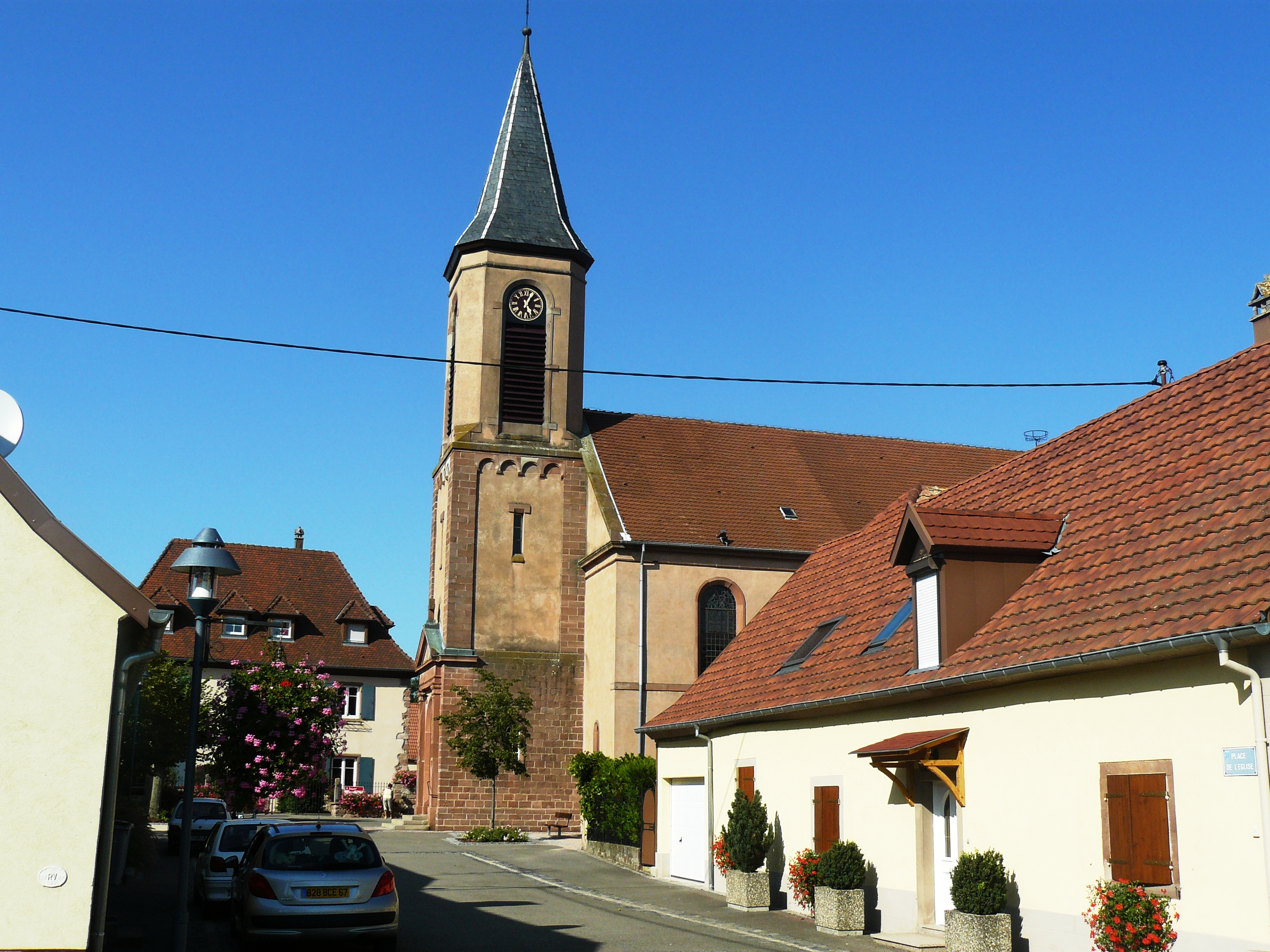 Église Saint-Arbogast de Saint-Pierre